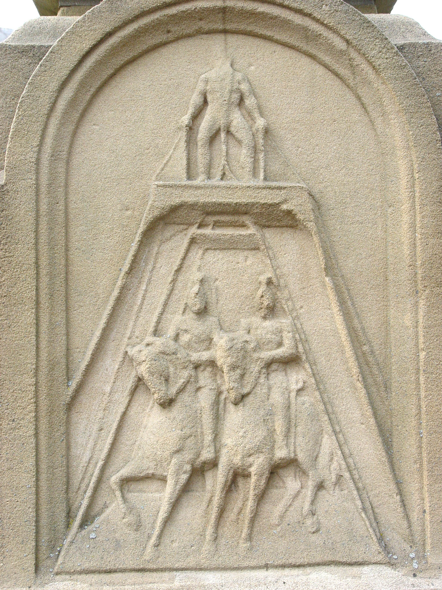 Grün.Monument zu Munneref Detail.